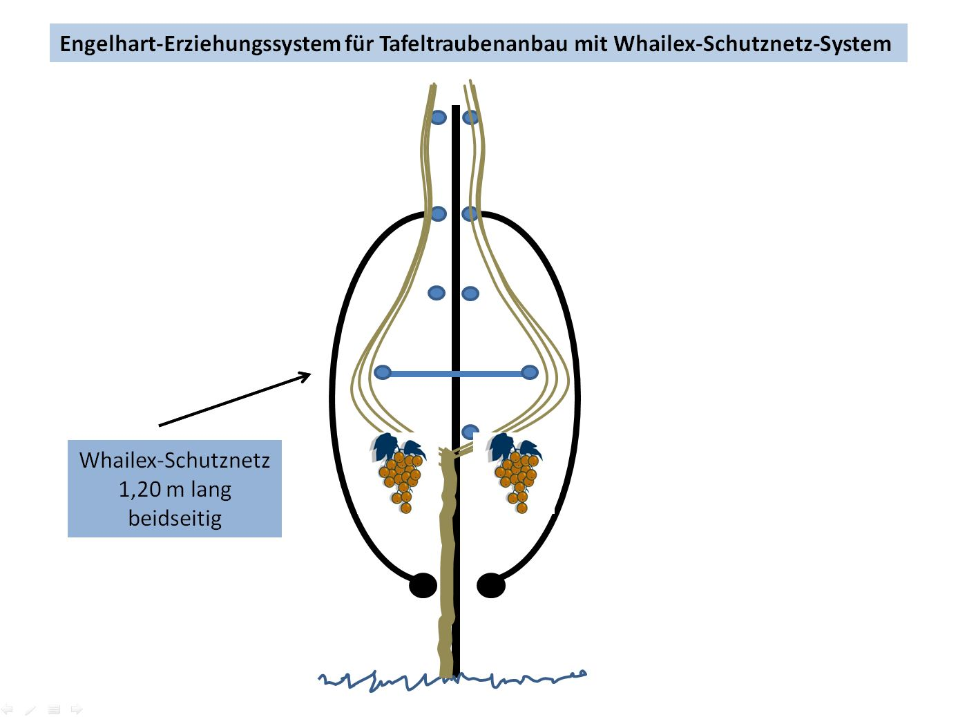 Engelhart Erziehung mit Whailex Schutznetz System - Schematische Darstelung mit Trieben